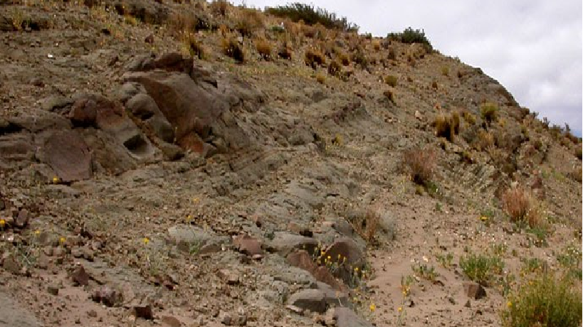 Afloramientos de la formacion Lotena